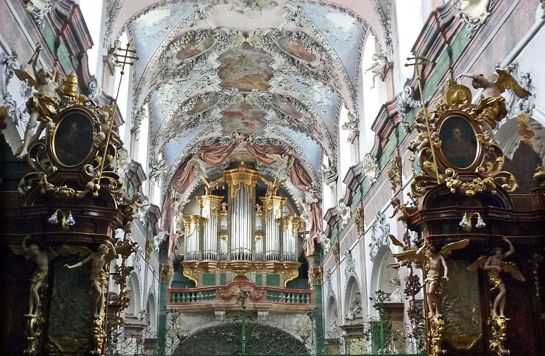 Kirchenschiff mit Deckengemälde von Wenzel Lorenz Reiner (um 1719) in der Klosterkirche Ossegg/Osek